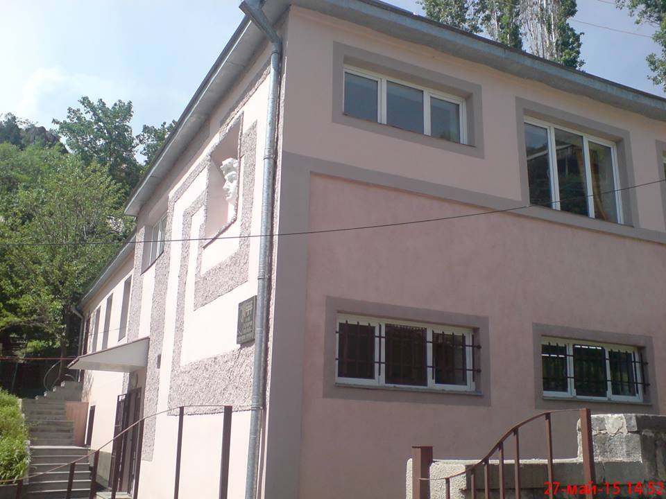 Ալավերդու գեղարվեստի դպրոց